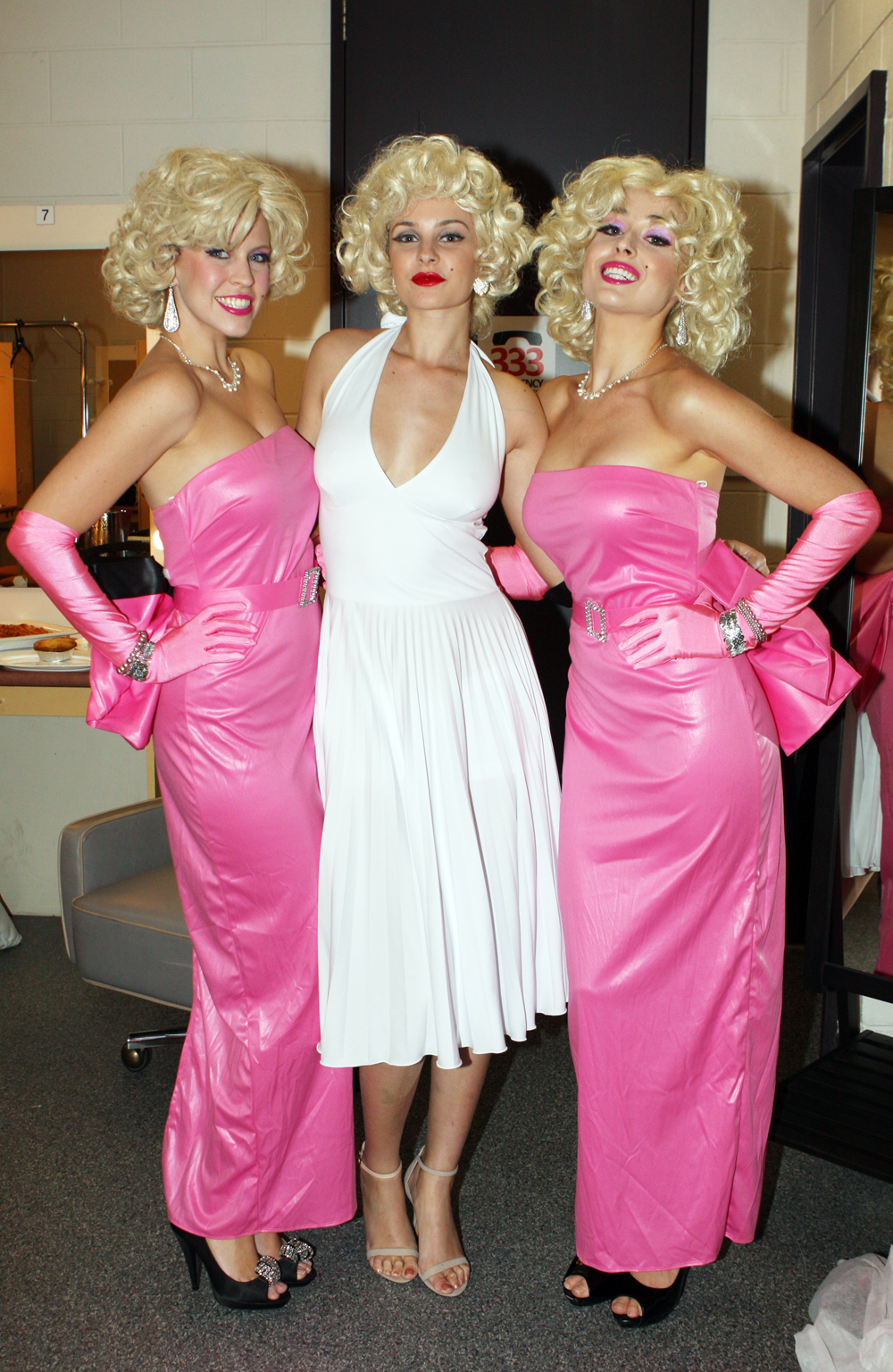 Marilyn Monroe